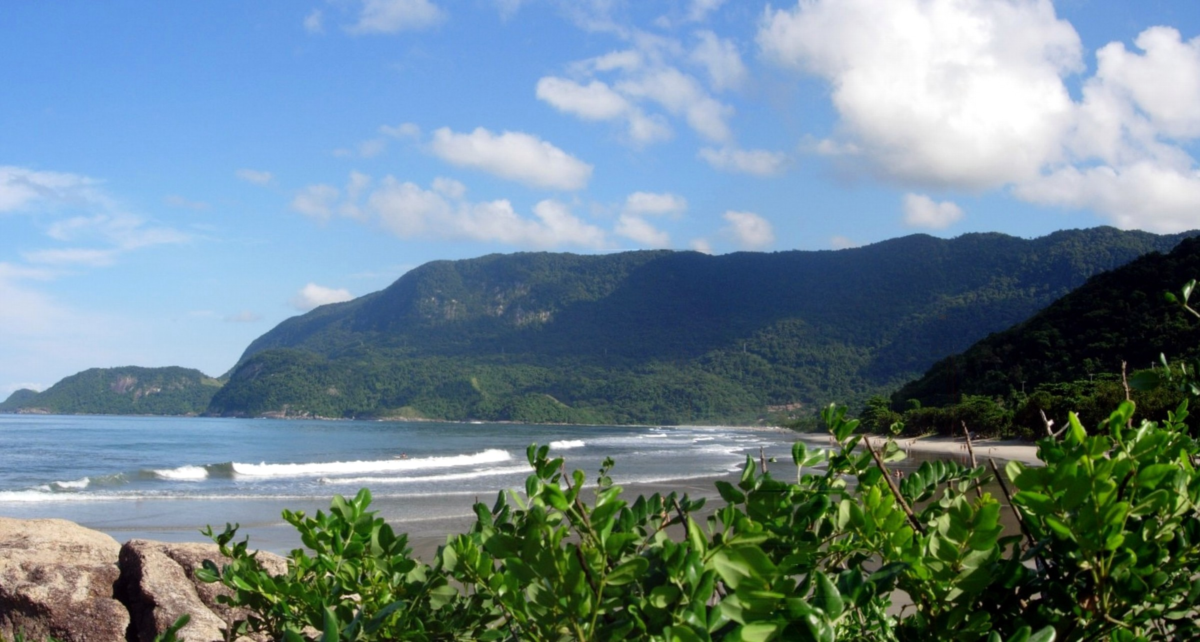 Guaecá - São Sebastião - Brasil; Serra do Mar with Atlantic rain forest